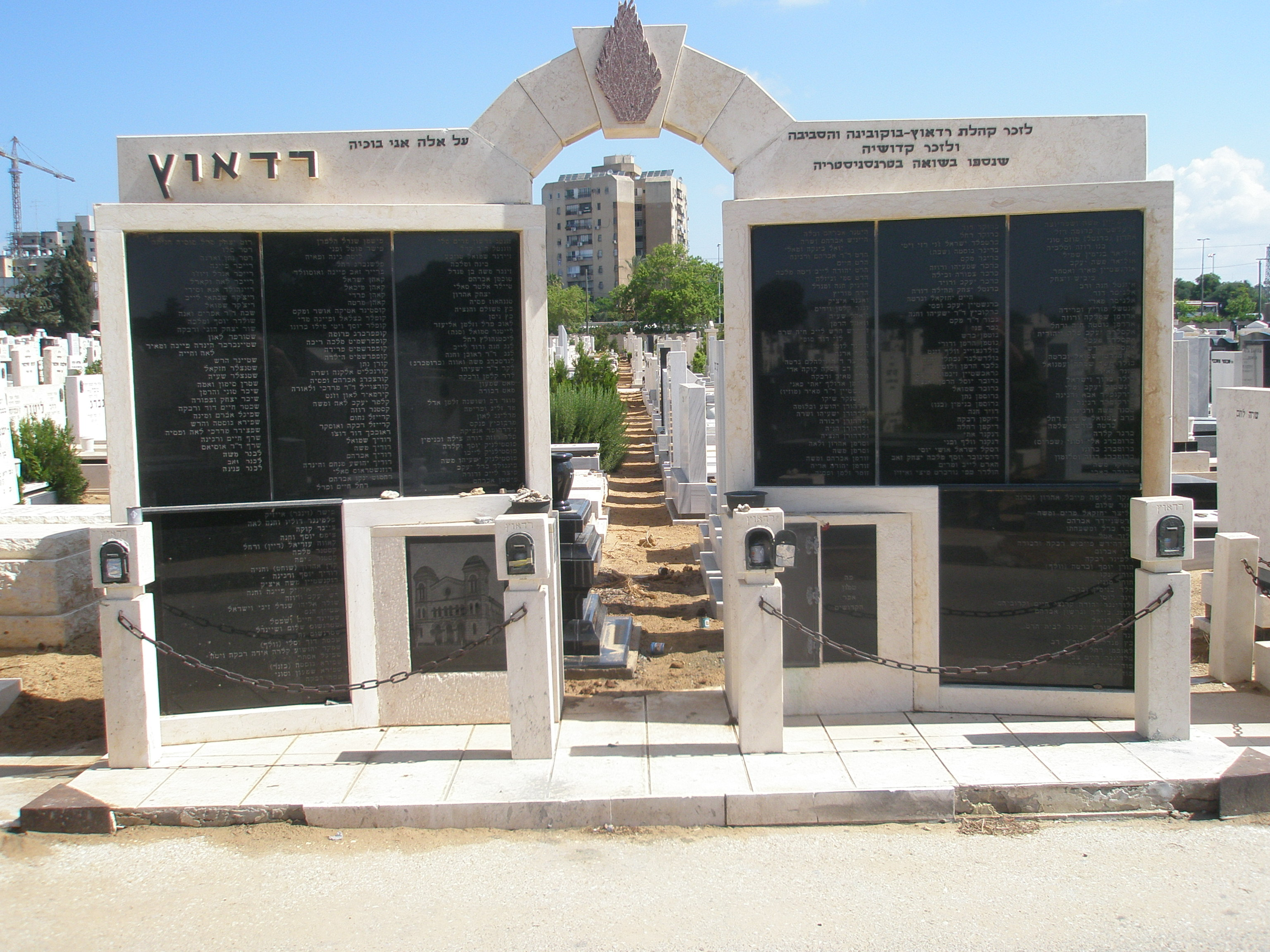 Rădăuţi memorial at Holon Cemetery